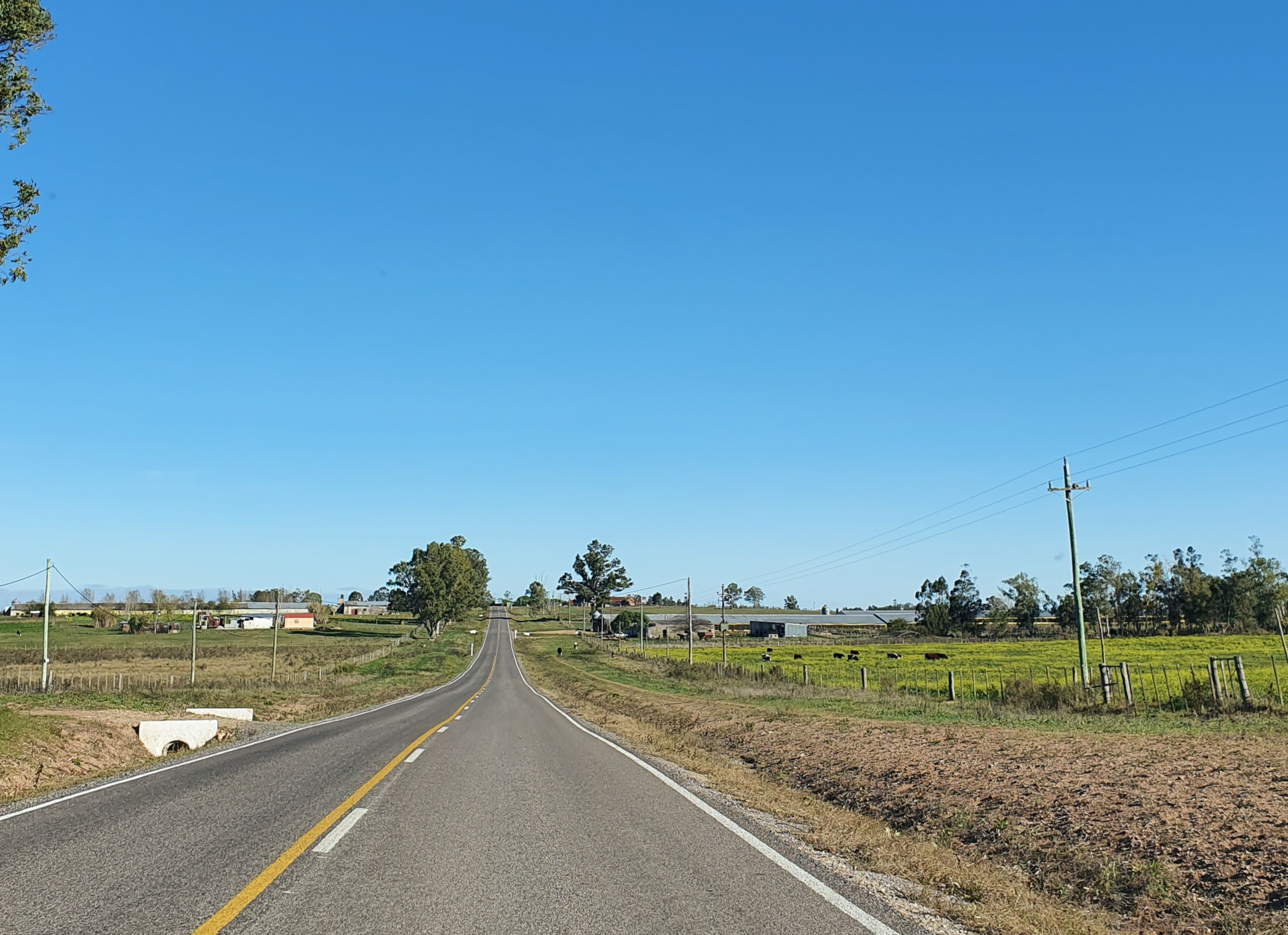 Ruta 40 próximo a la ruta 12, departamento de Canelones, Uruguay.